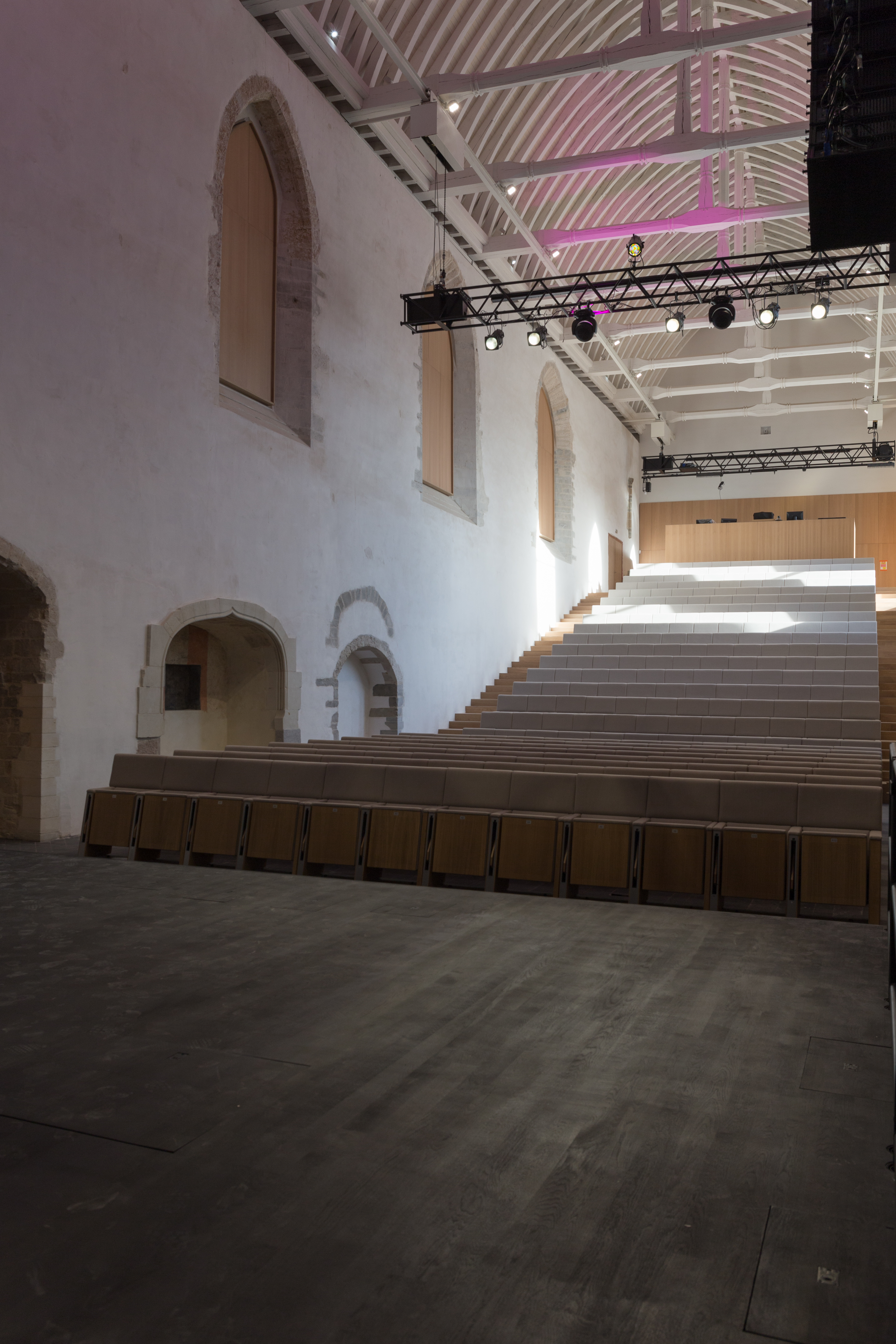 Portes ouvertes du centre des congrès de Rennes « Le Couvent des Jacobins » le 16 décembre 2017.